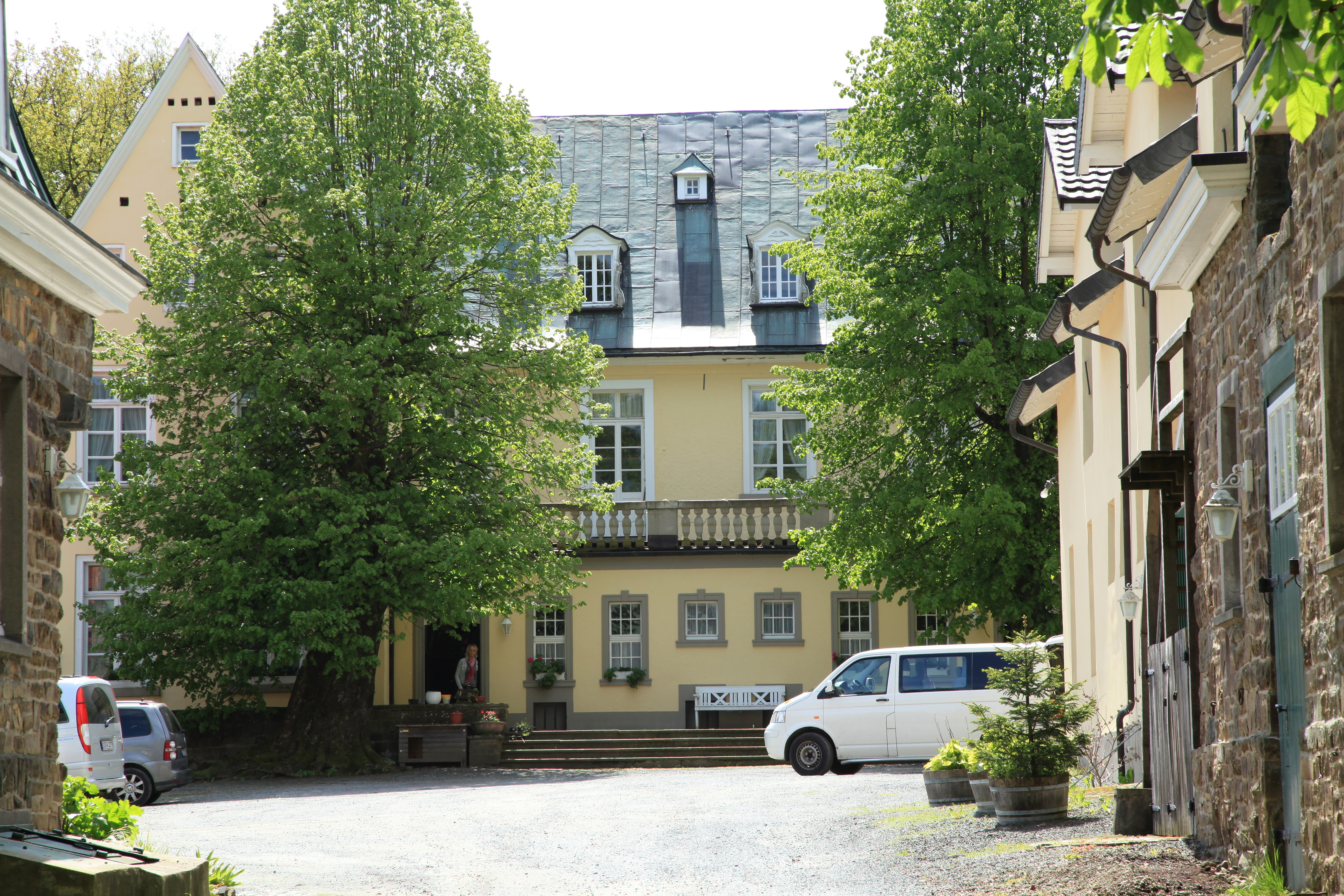 Haus Rhade, Alter Mühlenweg in Kierspe-Rhadermühle